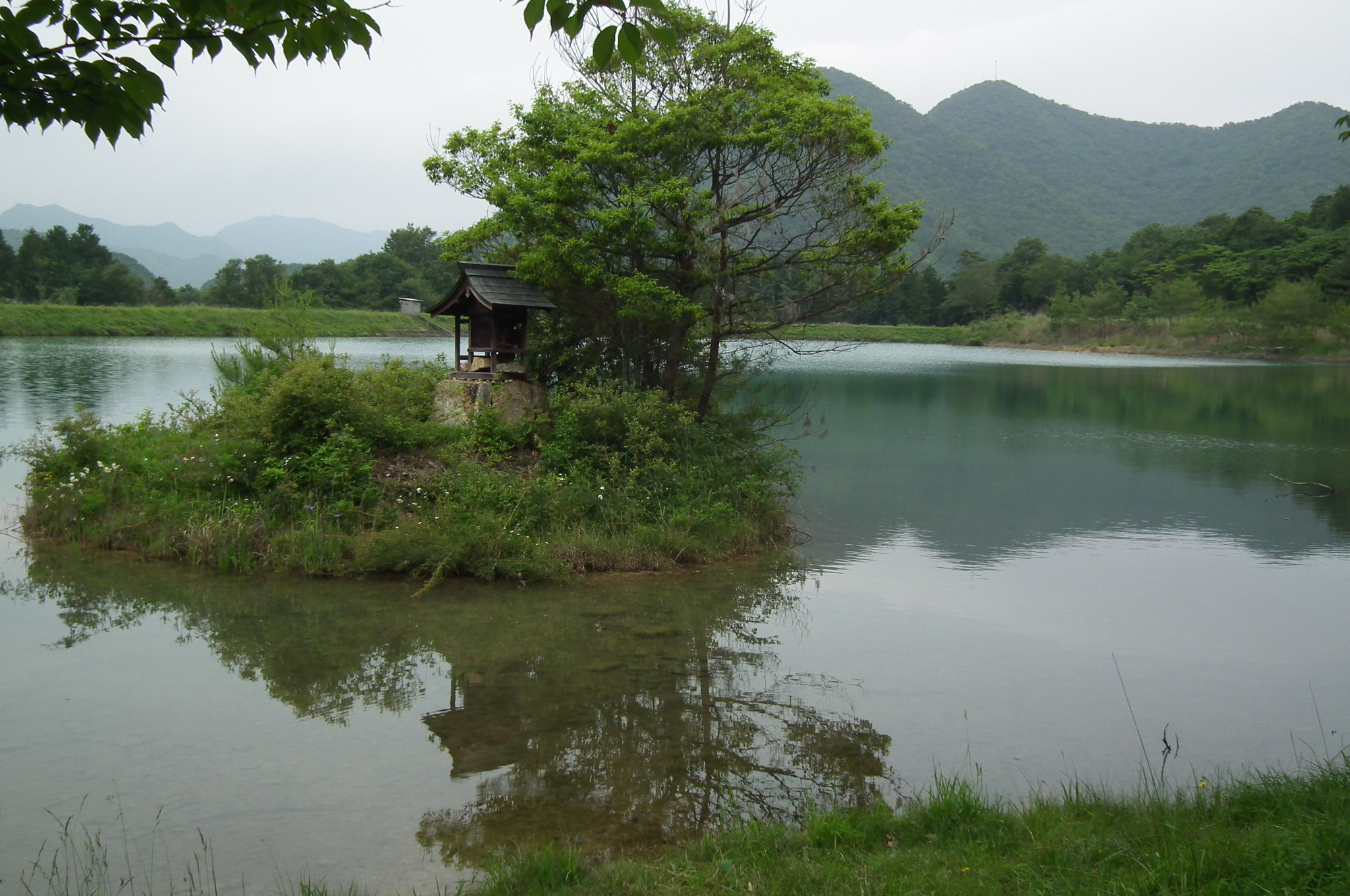 Fukutani-park 福谷公園・福谷池（兵庫県西脇市黒田庄町福谷）